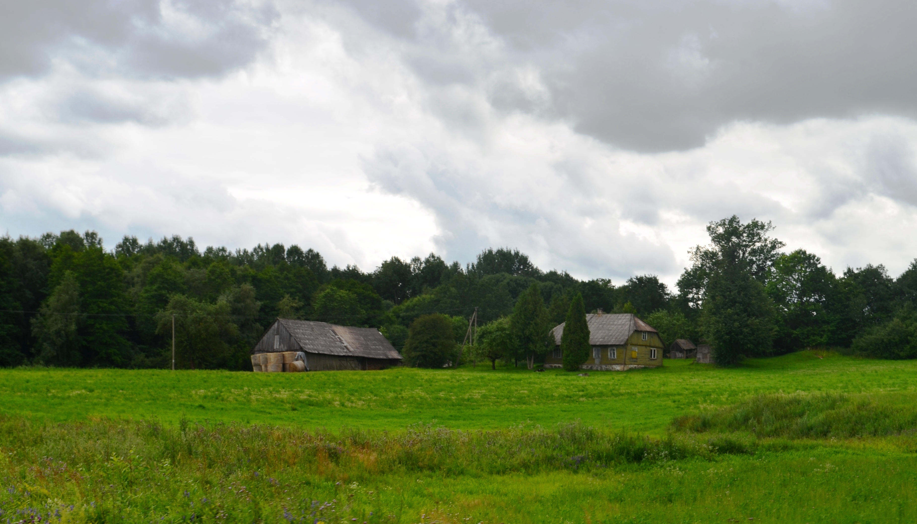 Drobūkščiai, Telšių raj. Žemaitėška: Druobūkštē, Telšiu raj.